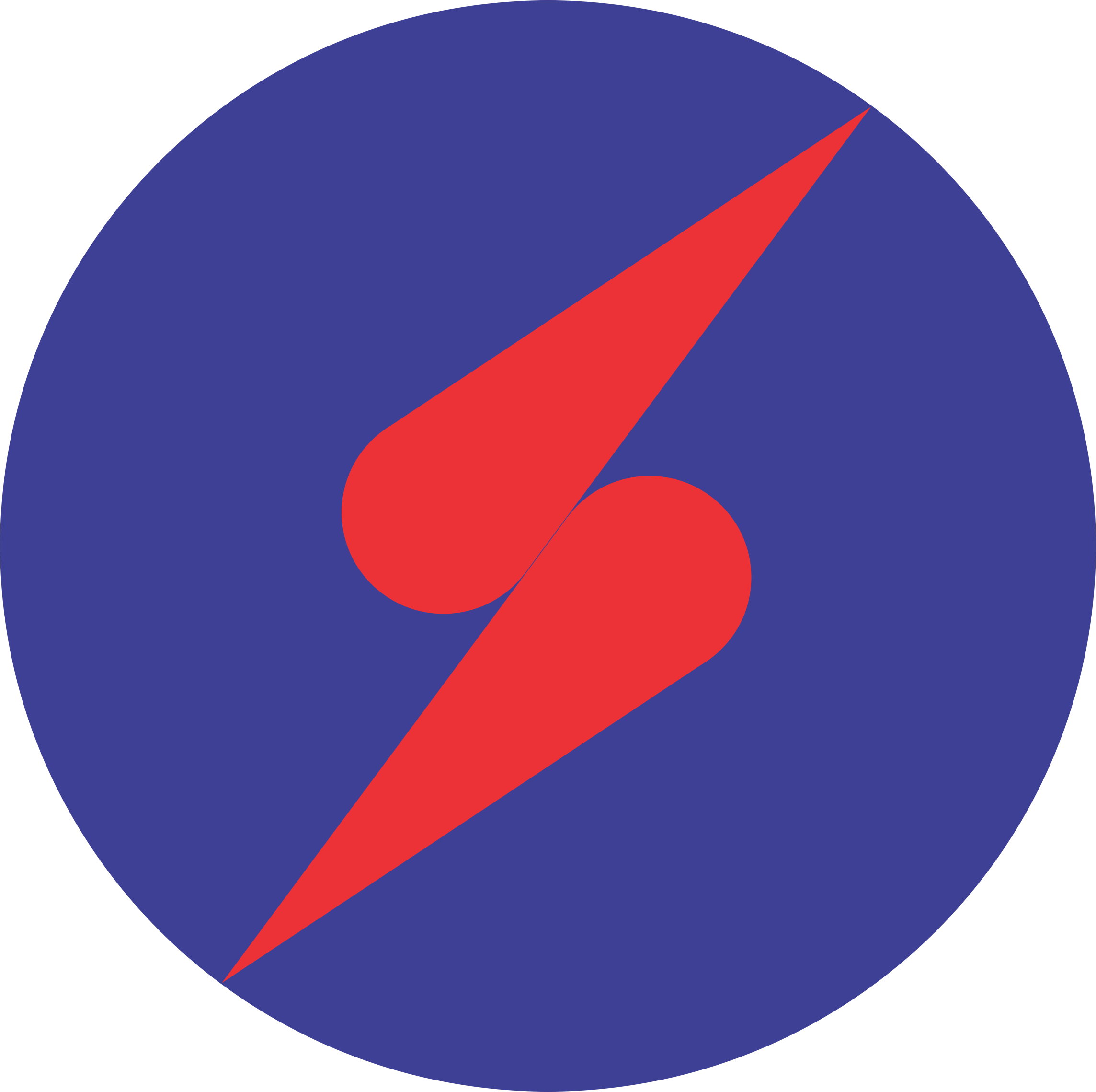 Es el logotipo vigente de la Organización Scalibur tras la elección de la nueva junta directiva en 2017. Posee un diseño simple en forma y color. Su cambio reflejó los cambios internos de la Organización.